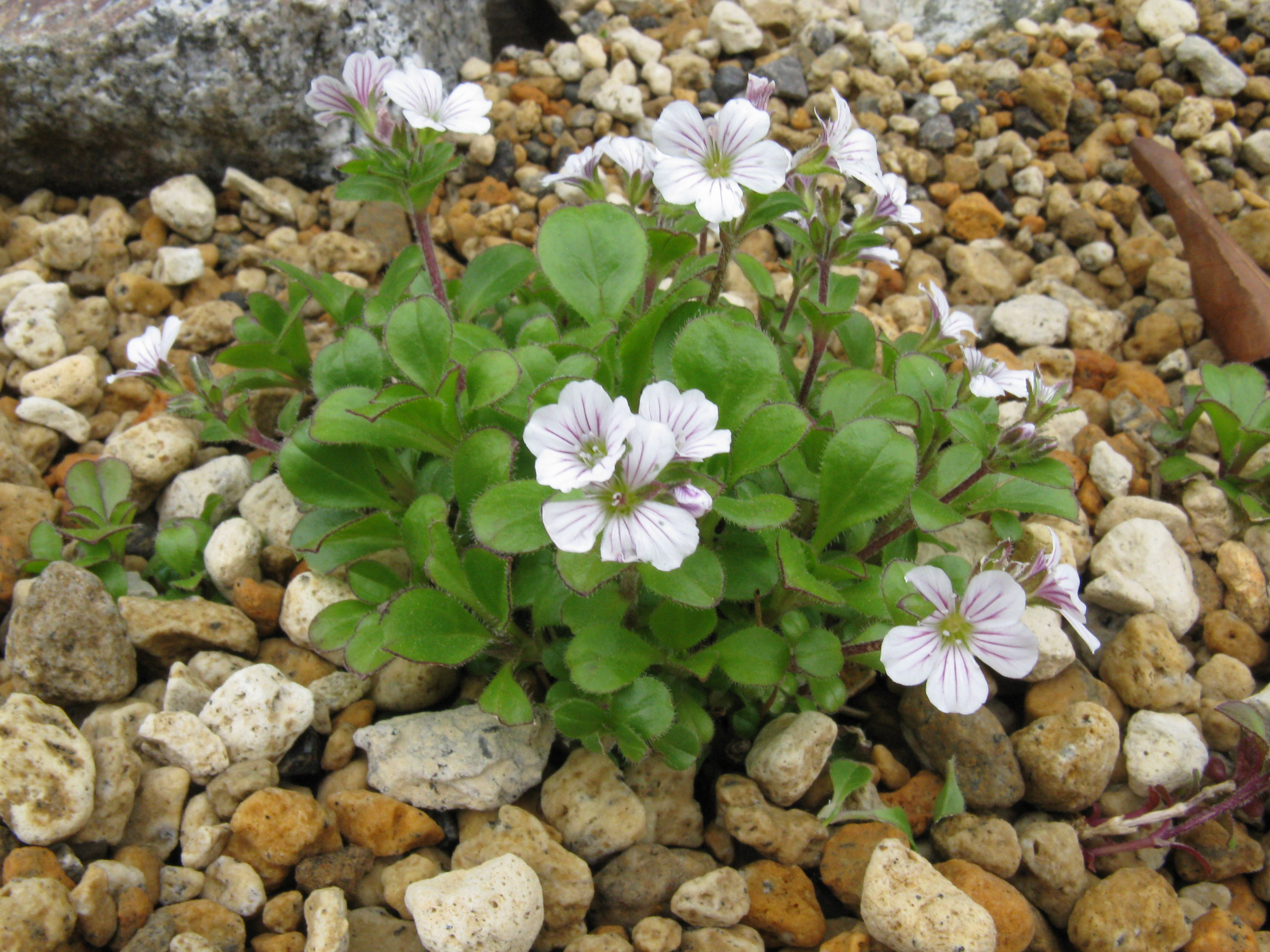 Gypsophila cerastioides